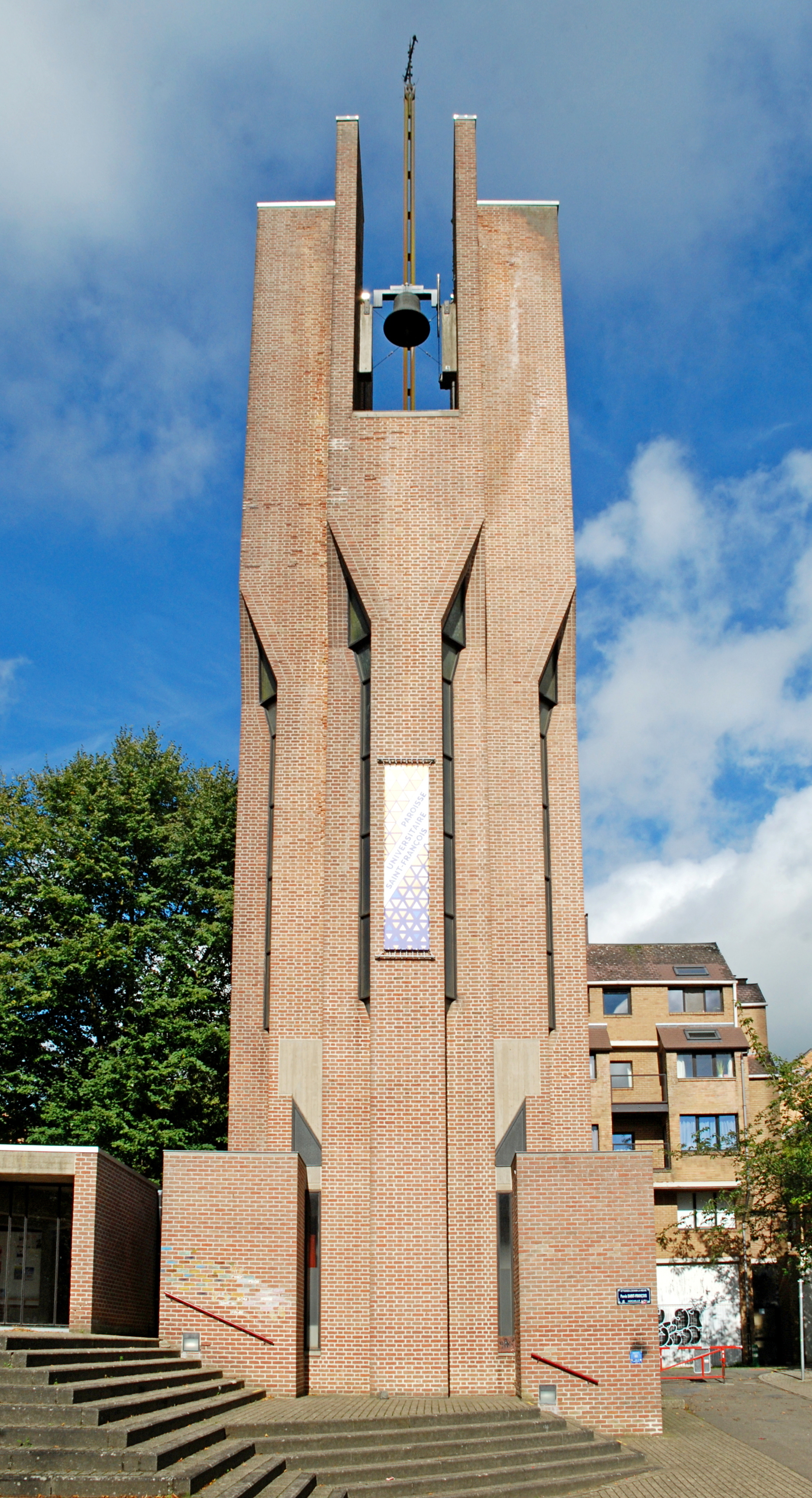 Belgique - Louvain-la-Neuve - Église Saint-François d'Assise (architecture brutaliste, architecte Jean Cosse 1982)